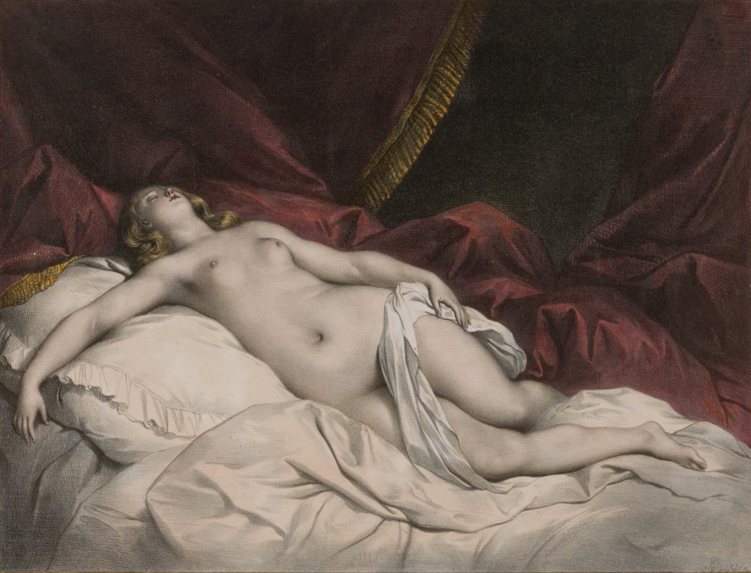 "Lamav akt". Koloreeritud litograafia. Lehe kõrgus 21,8 cm ja laius 28,7 cm. MUIS:TKM TR 15823 G 4497